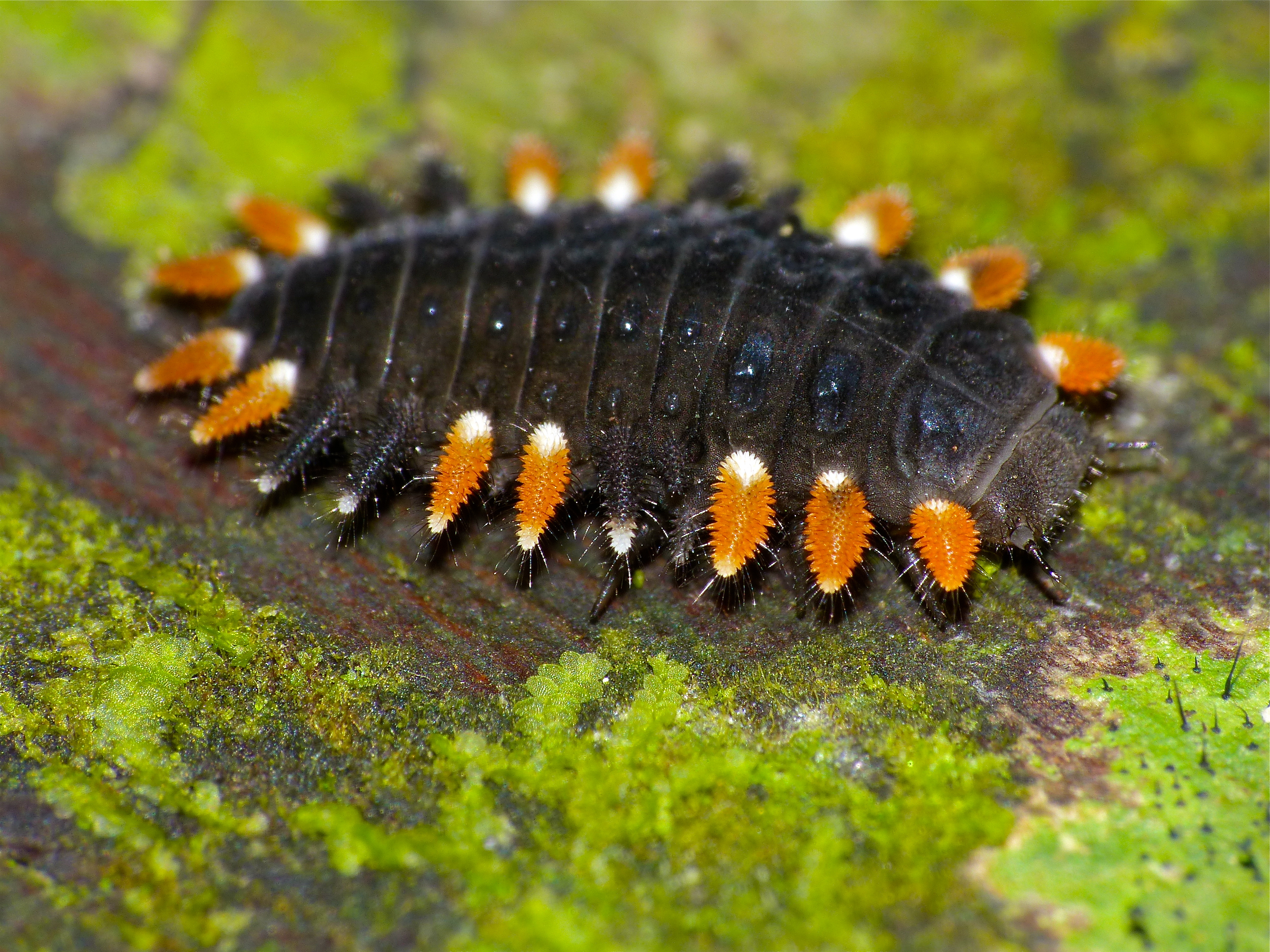 Night Walk Trail, Mulu NP, Sarawak, MALAYSIA